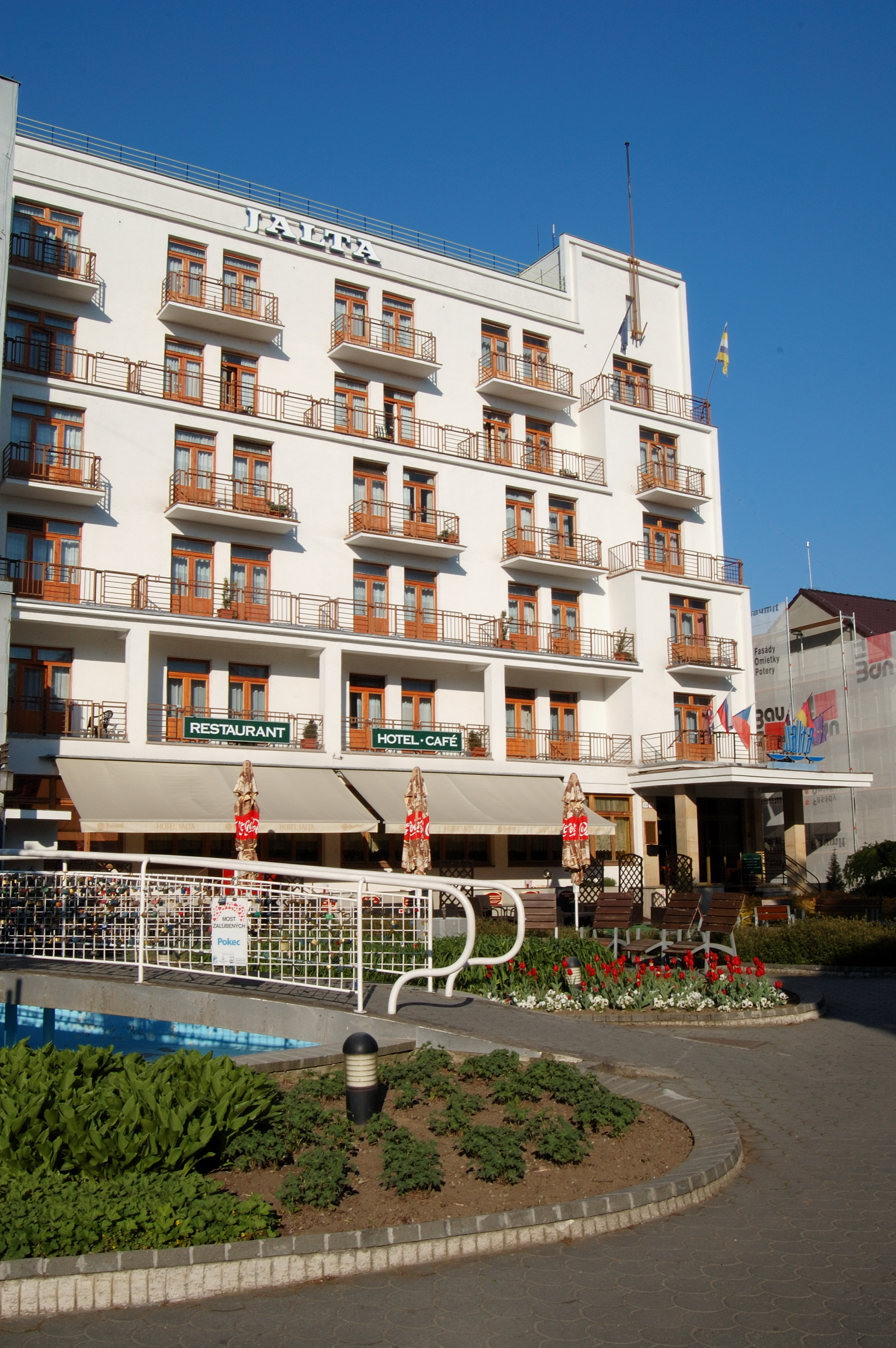 Hotel Jalta (Exclesior) Piestany